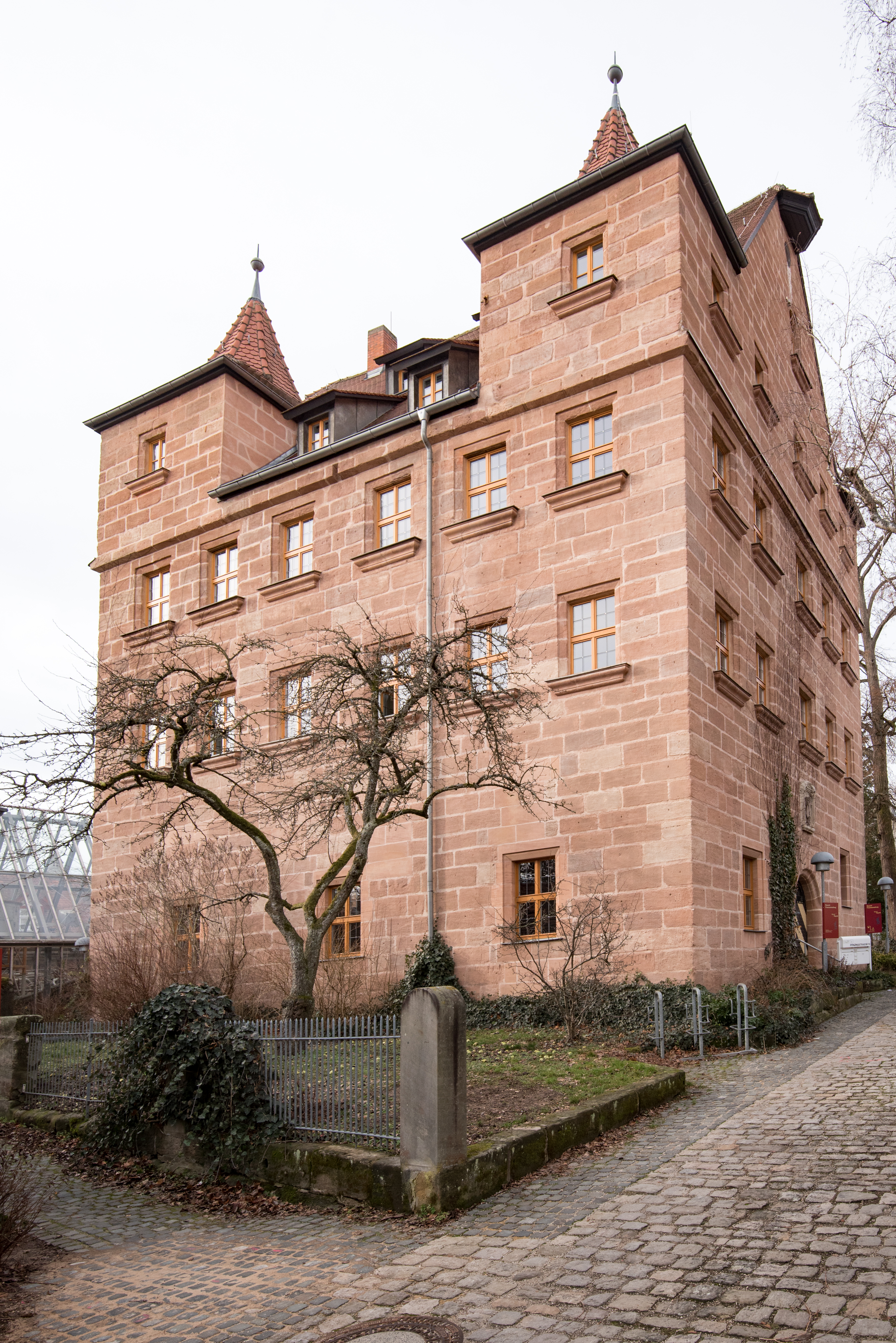 Feucht, Pfinzingstraße 10